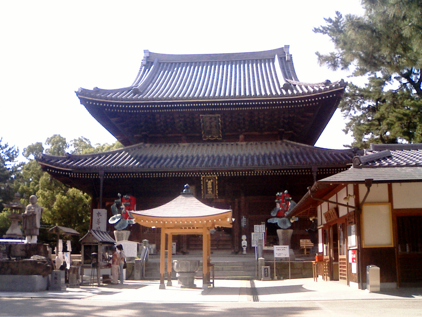 善通寺金堂（本堂） - 日本国香川県善通寺市（善通寺）